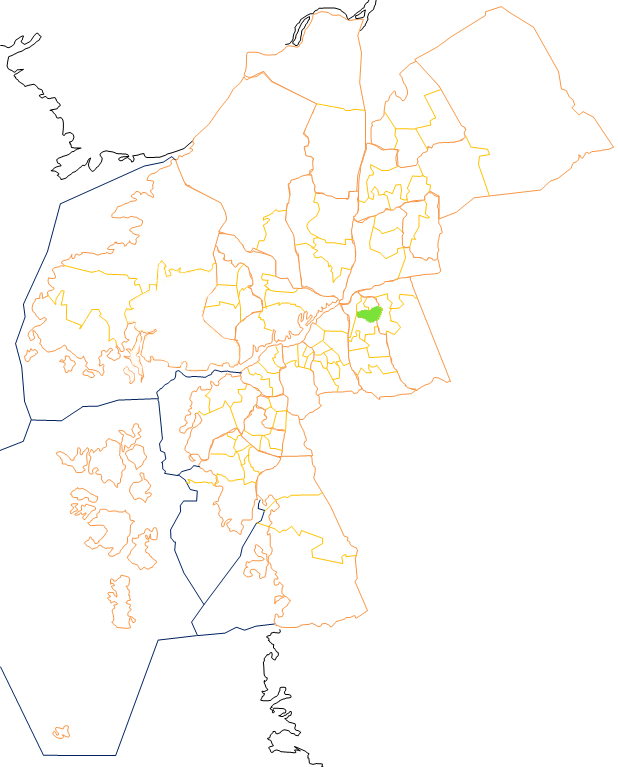 Karta som visar primärområdes belägenhet i Göteborg